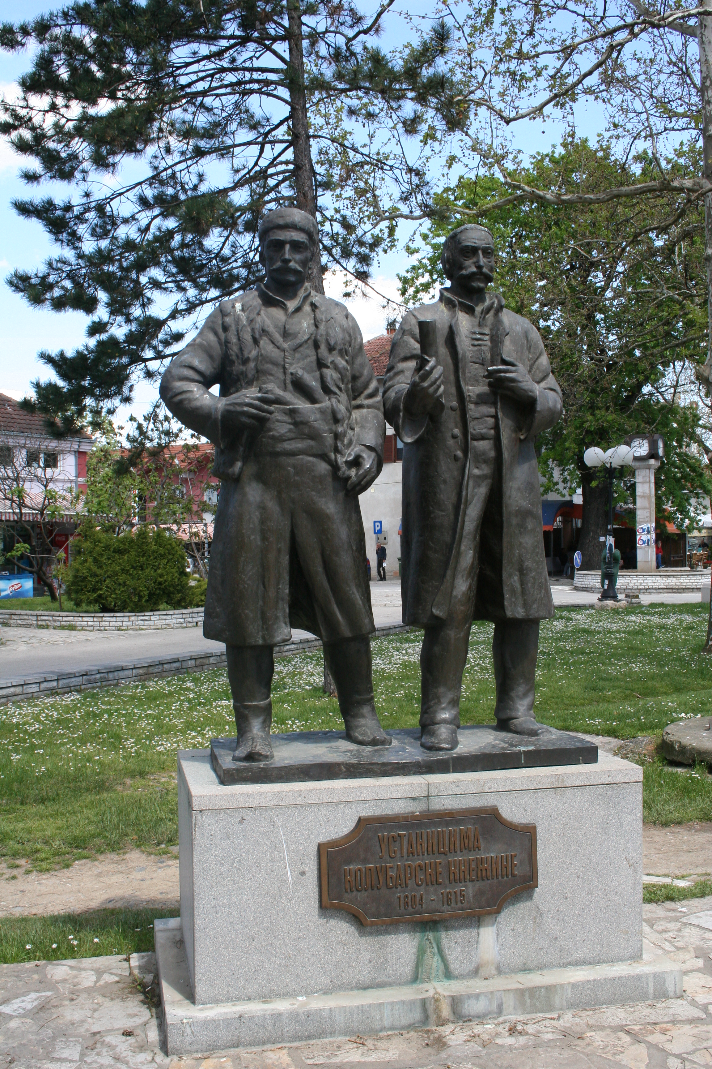 Mionica i spomenici u njoj